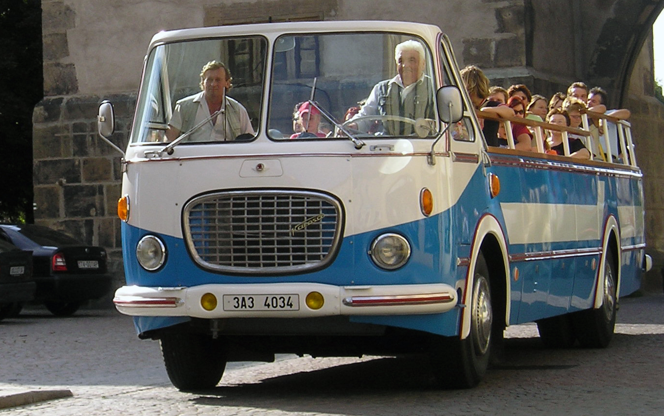 Škoda 706 RTO vyhlídkový projíždí Pražskou branou ve Vysokém Mýtě při příležitosti oslav 110 let založení firmy Sodomka (Karosa).